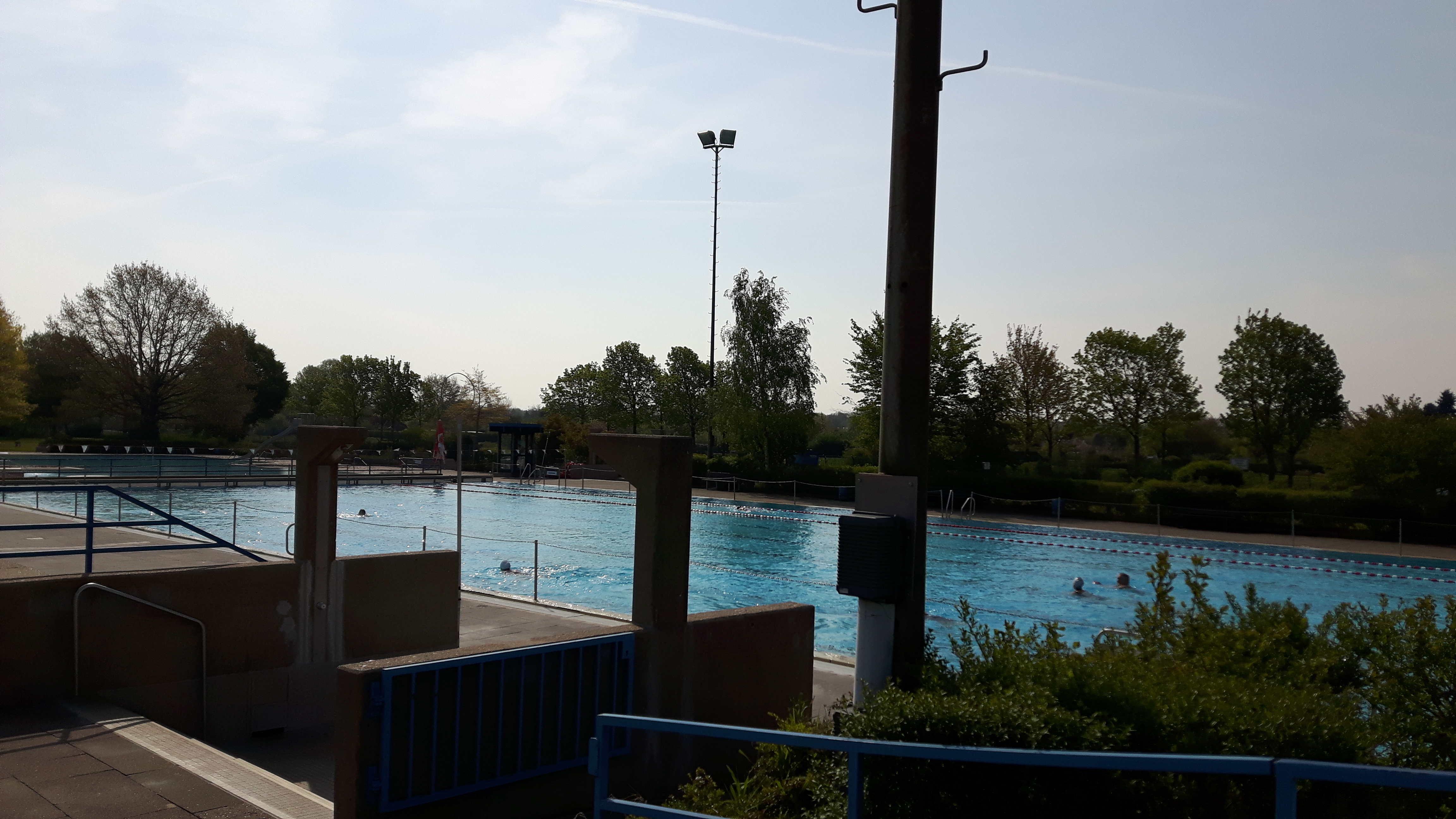 Schwimmerbecken des Lister Bads, 1.5.2017, Hannover